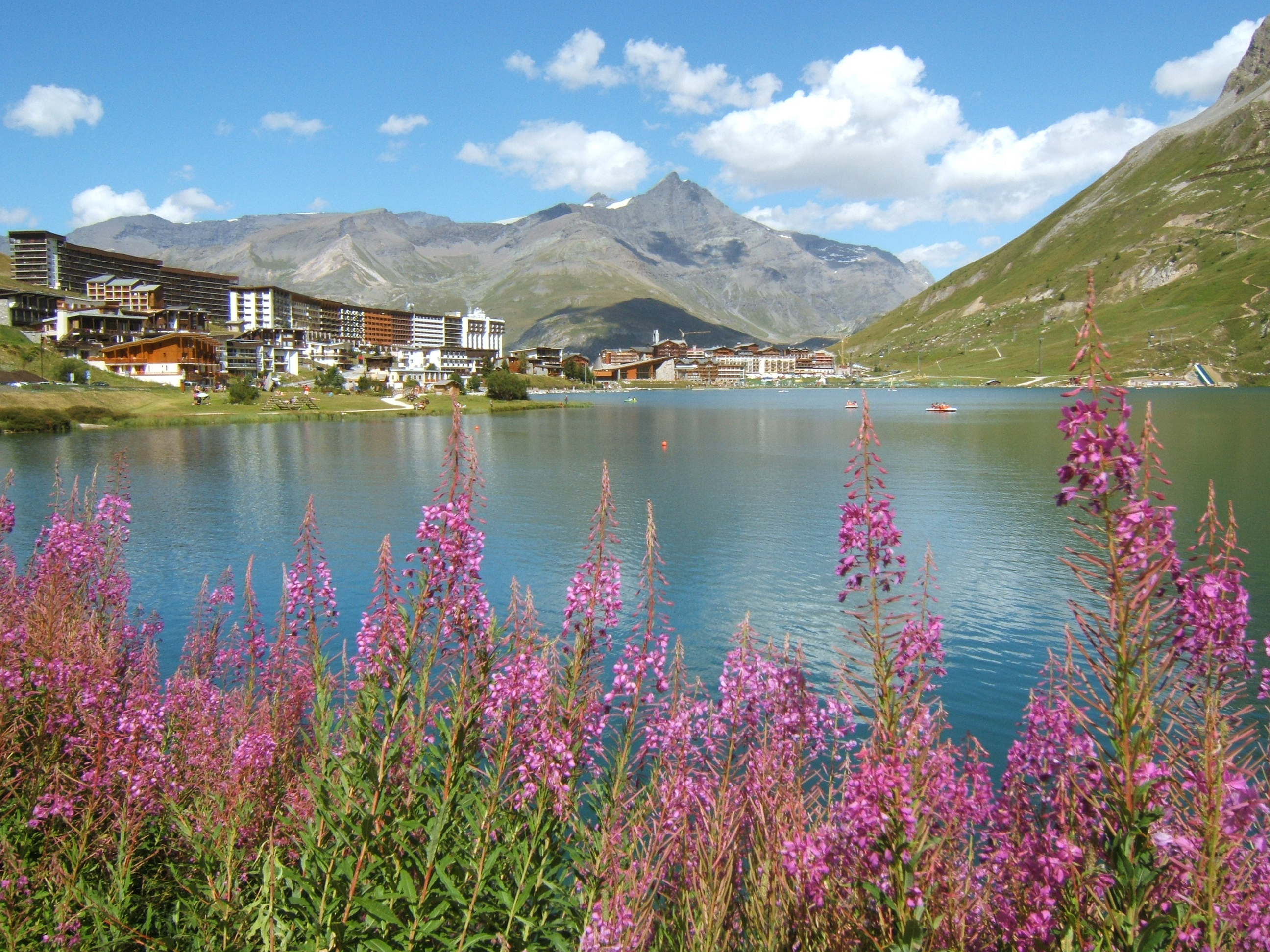 Le lac de Tignes (Profondeur : 45 métres).